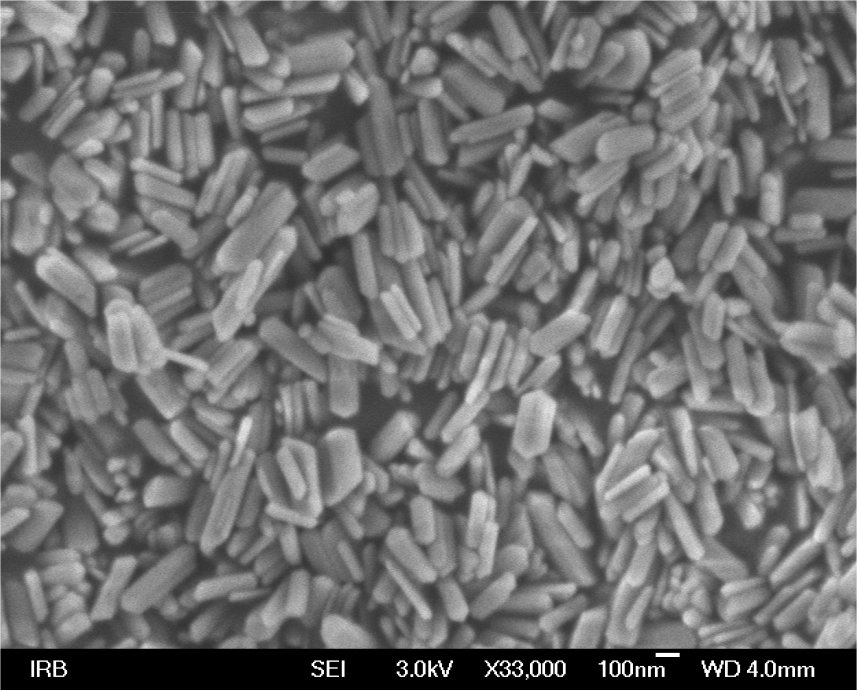 FE-SEM slika uzorka getita